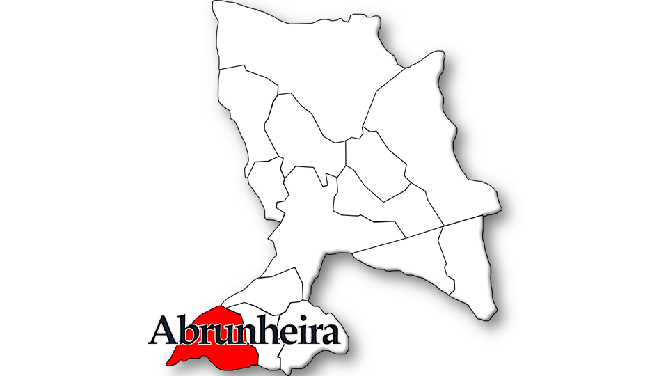 População